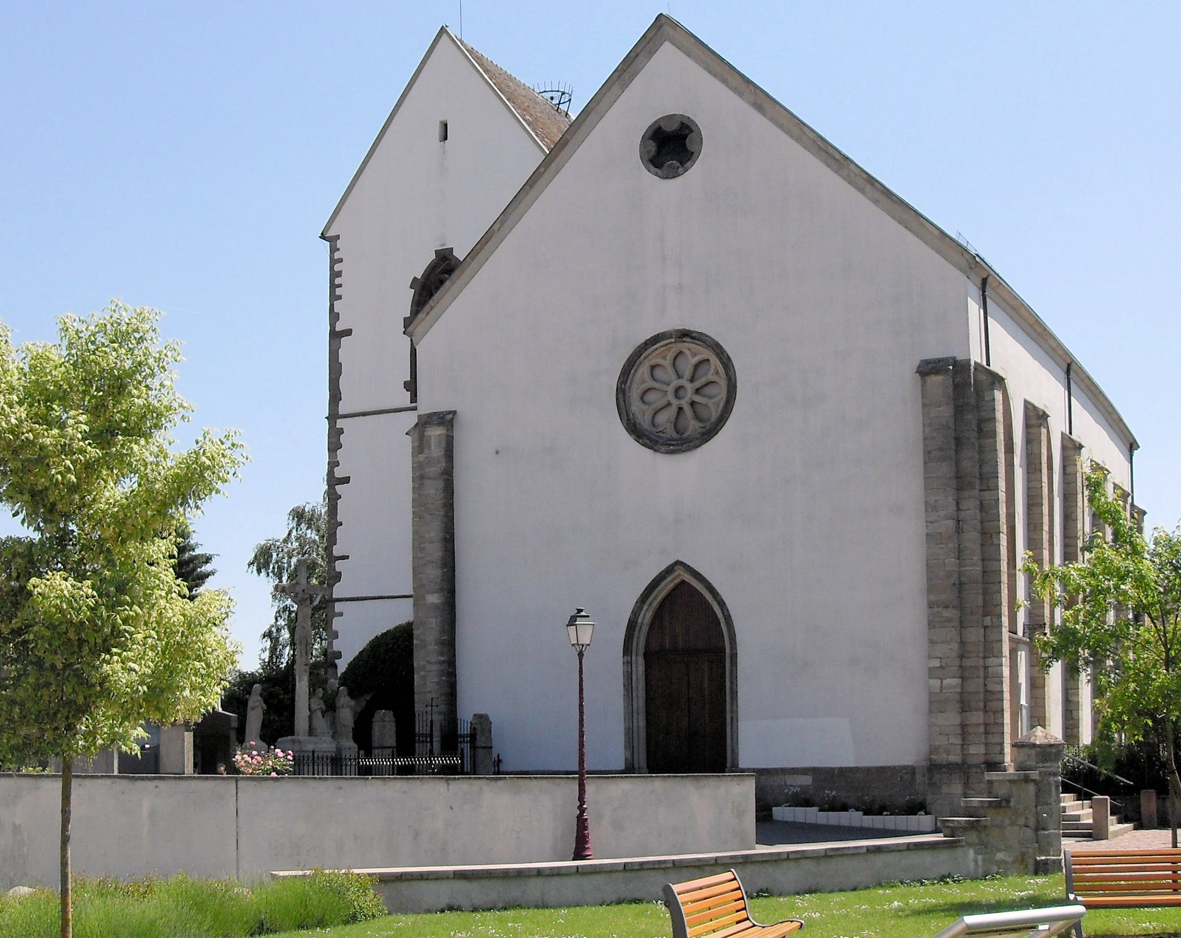 L'église Saint-Martin à Spechbach-le-Haut